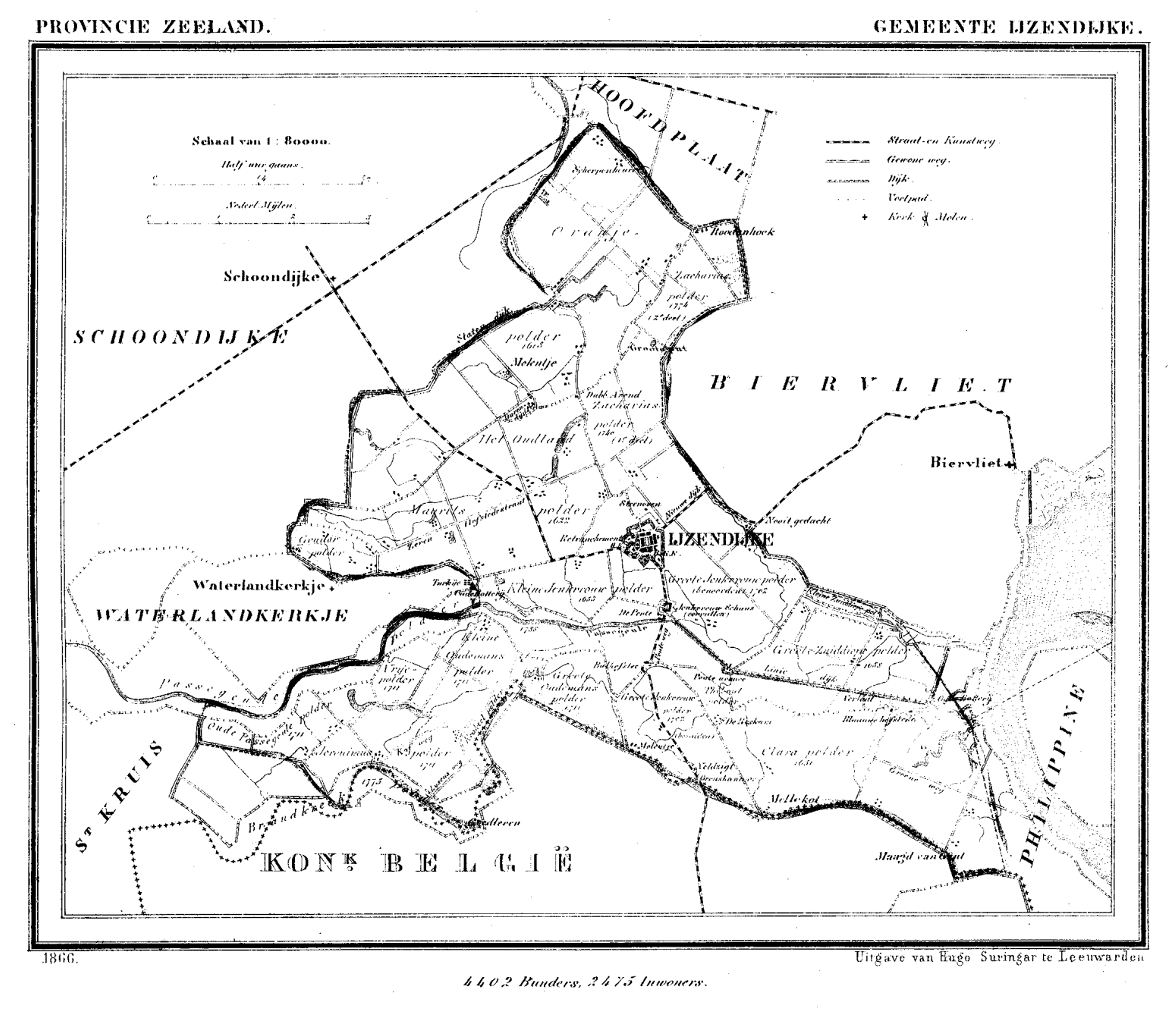 Gemeente IJzendijke, Zeeland, Nederland